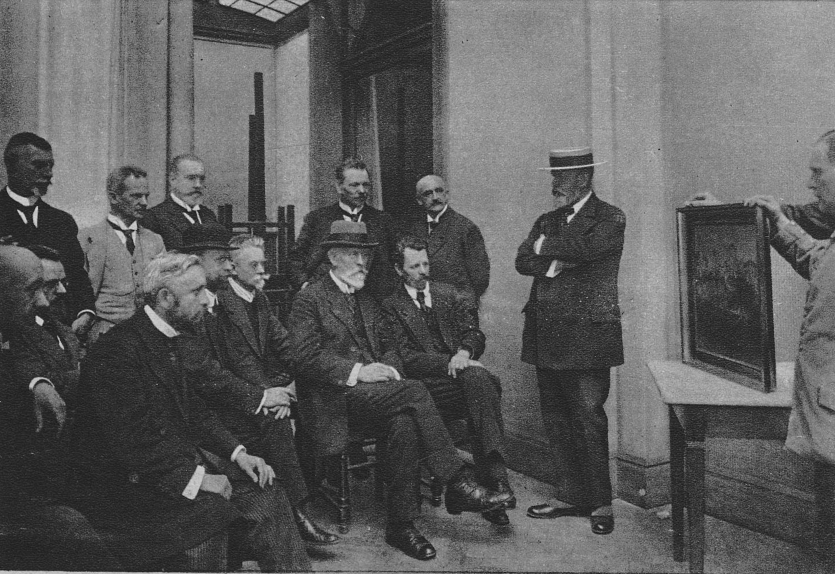 Die Jury der Großen Berliner Kunstausstellung 1917 bei der Arbeitvon links nach rechts, sitzend: Professor Max Rabes, Bildhauer Gustav Schmidt-Cassel, Maler Karl Wendel (1878–1943), Berthold Genzmer, Adolf Schlabitz, Professor Friedrich Kallmorgen, Professor Arthur Lewin-FunckeStehend: Karl Oenike, Professor Fritz Heinemann, Professor Reinhold Felderhoff, Professor Wilhelm Haverkamp, Professor Max Schlichting, Professor Hans Looschen